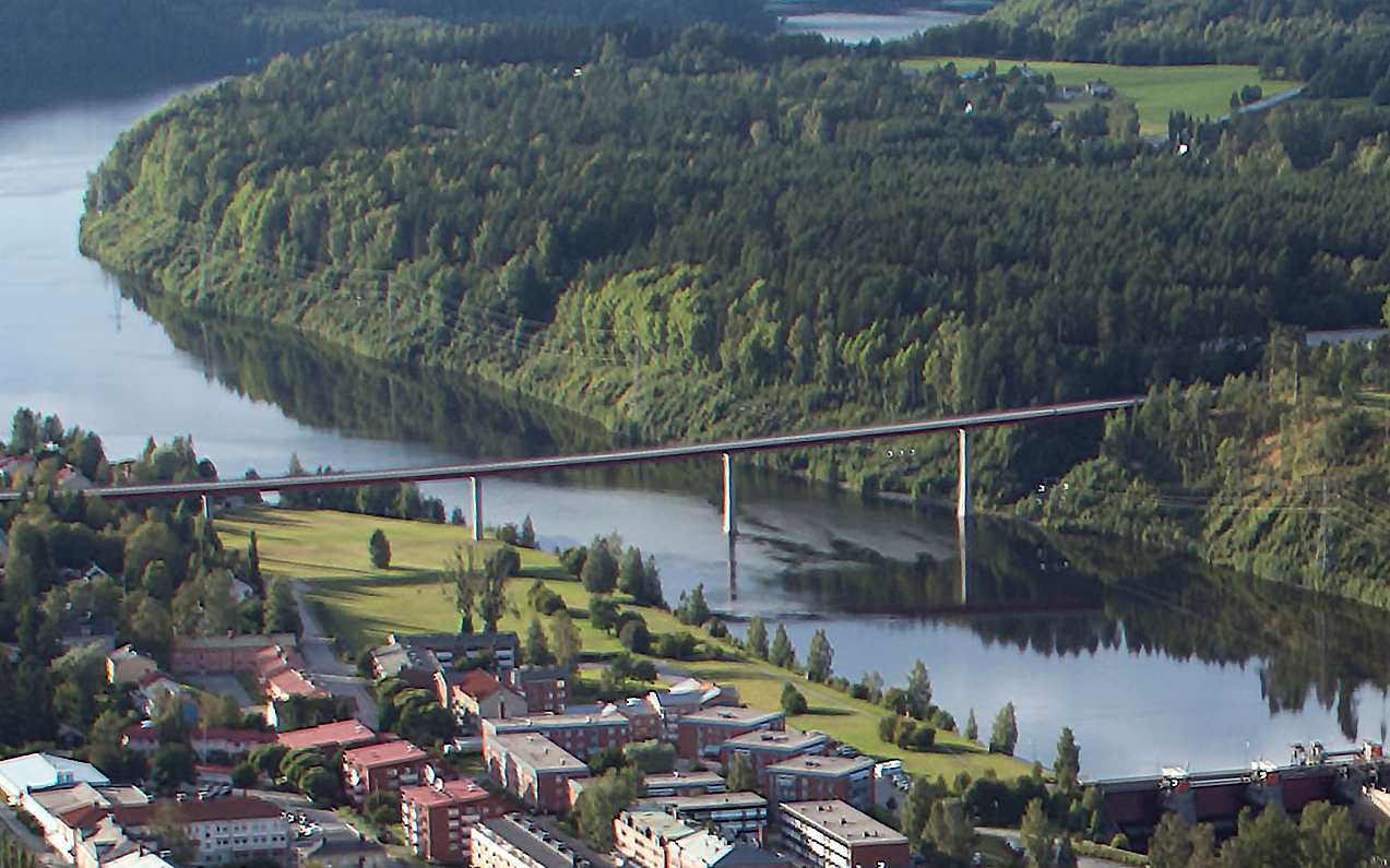 Ångermannabron in Sollefteå